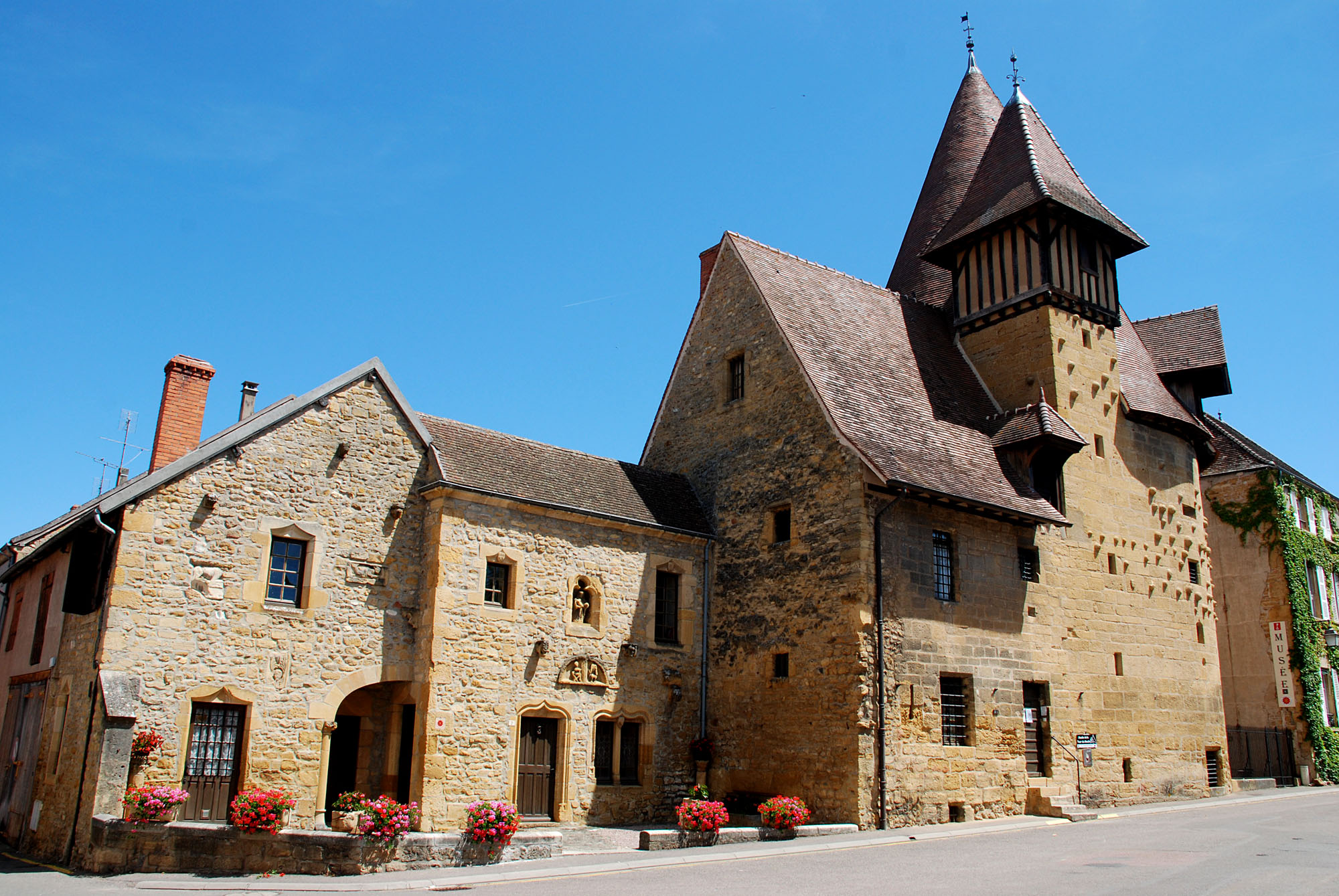 Tour du Moulin Marcigny